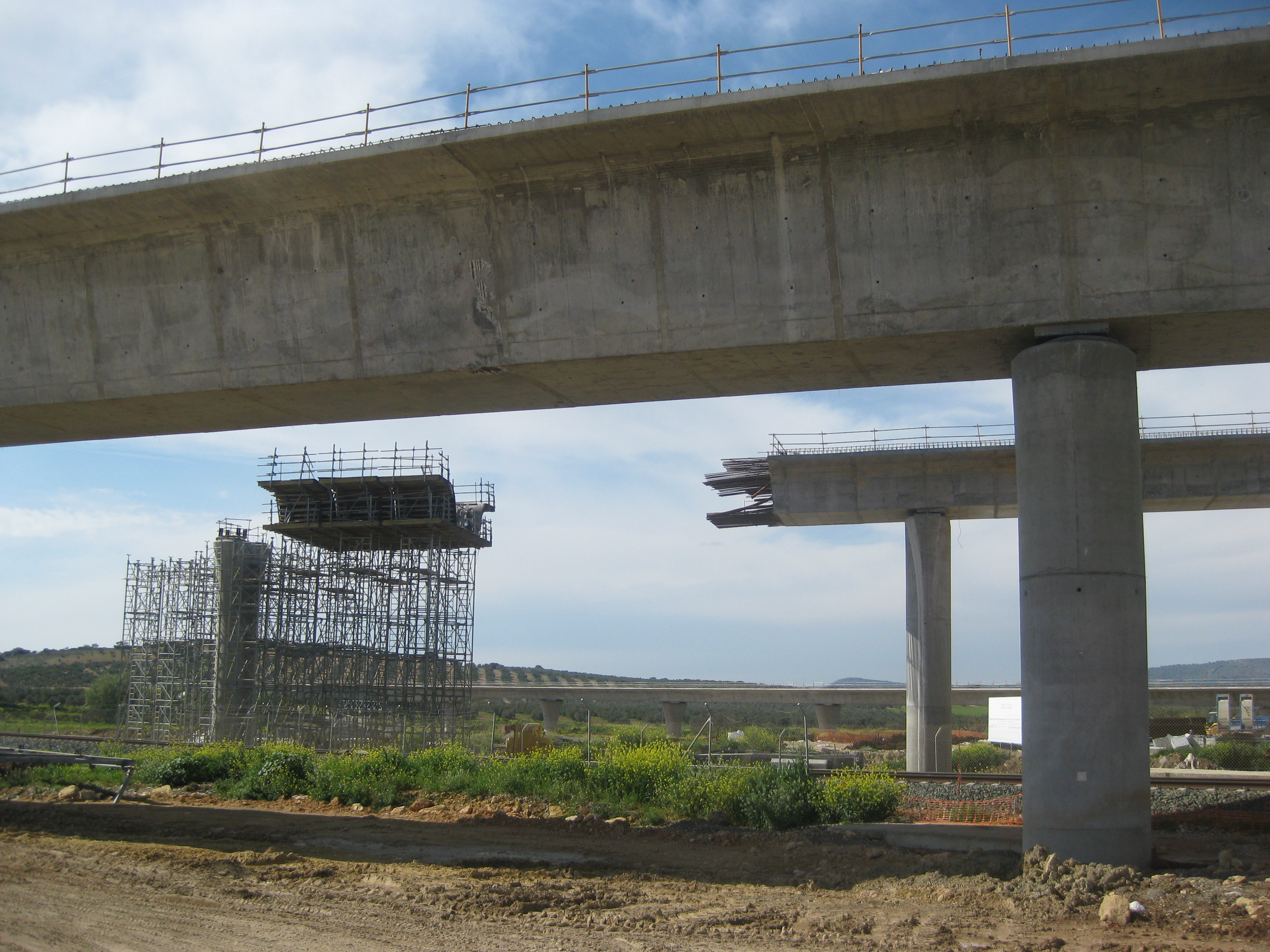 AVE Sevilla - Granada